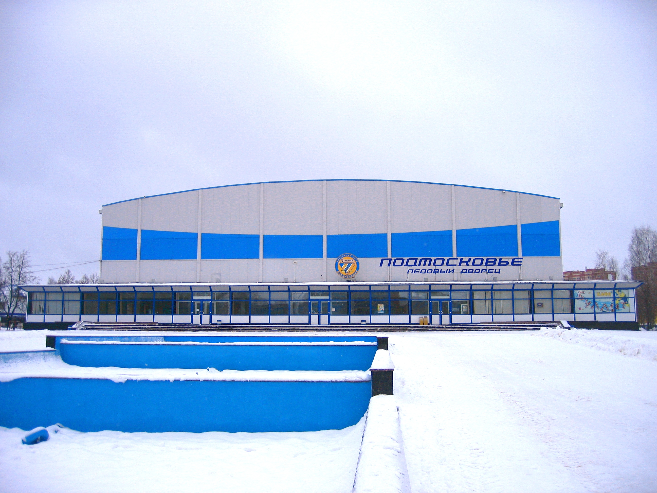 Eissporthalle in Woskressensk